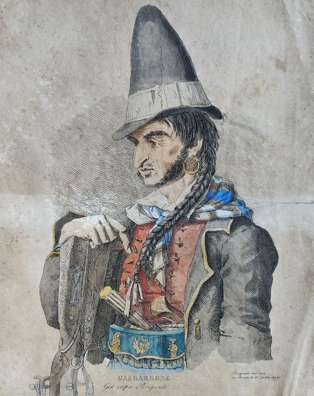 Antonio Gasbarrone